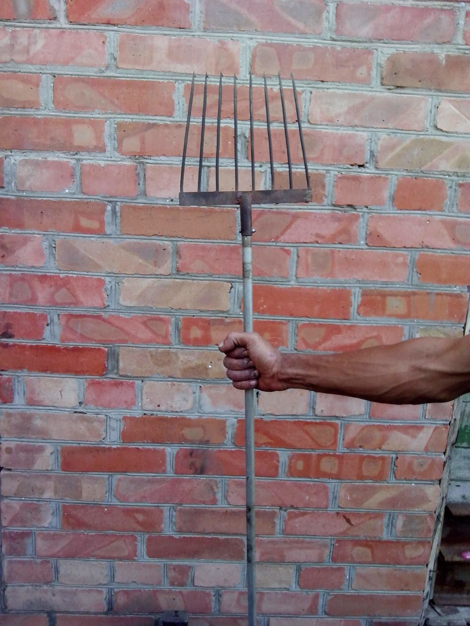 Сандоль - браконьерское орудие рыболовства для ловли рыбы ночью, во время того как рыба стоит в воде.